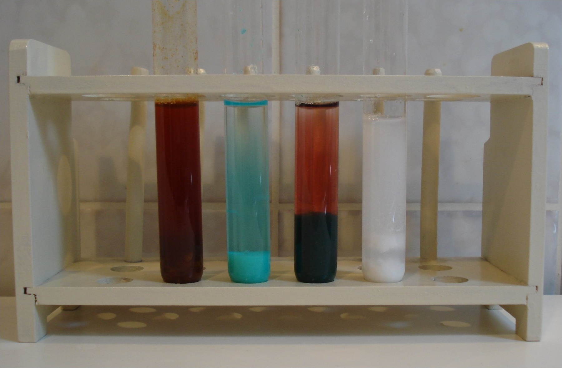 Niederschläge von Metallhydroxiden: Eisen(III)-, Kupfer(II)-, Cobalt(II)- und Zinn(II)-hydroxid